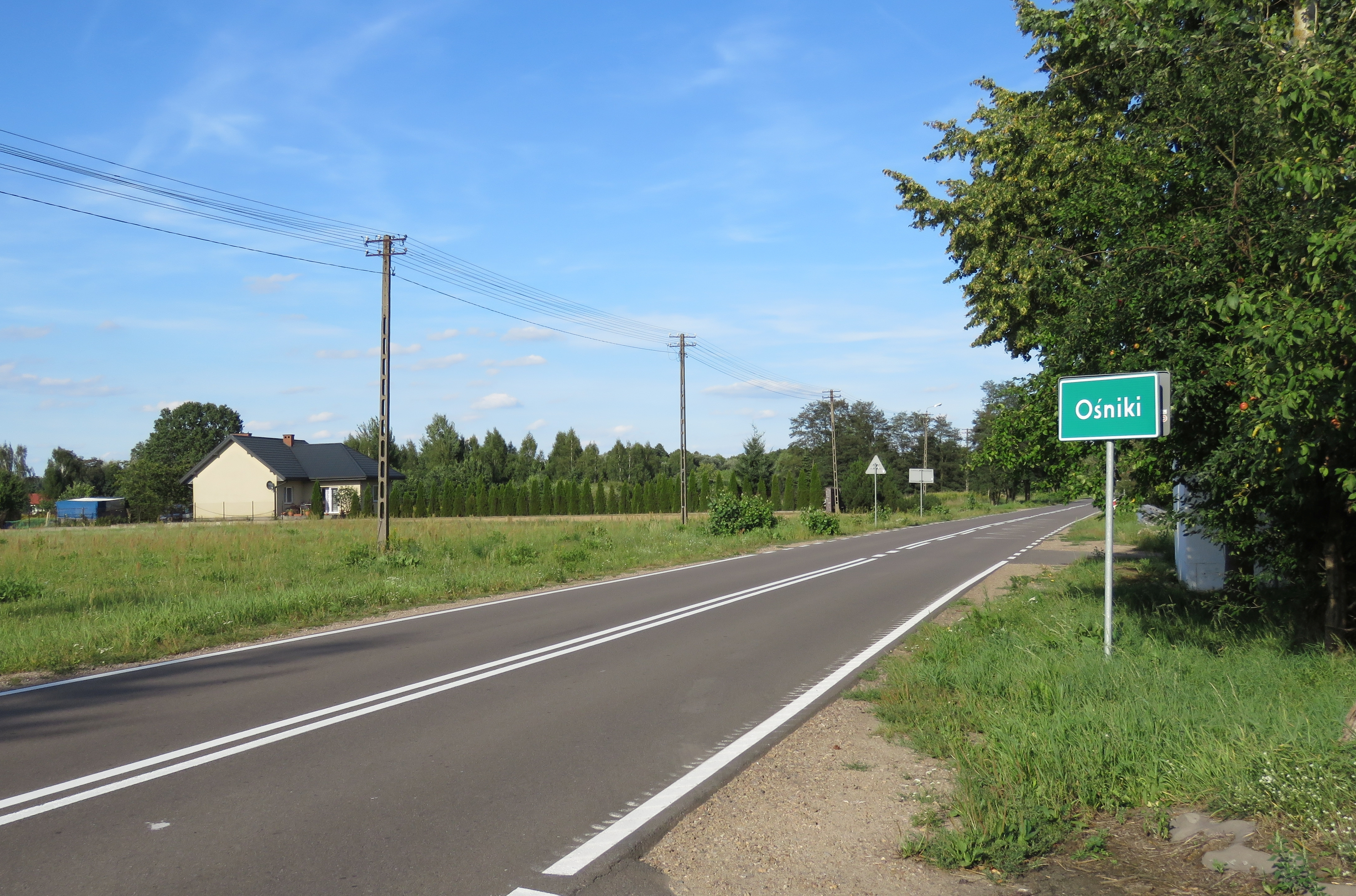 OŚNIKI